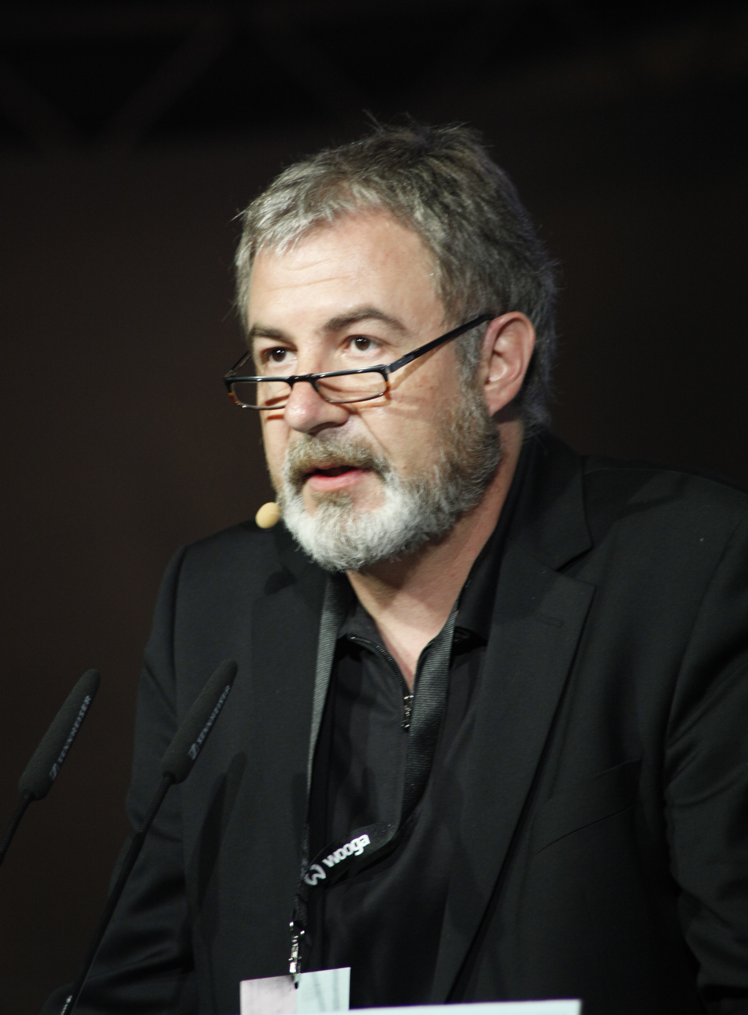 (cc) iStockphoto I re:publica 2012